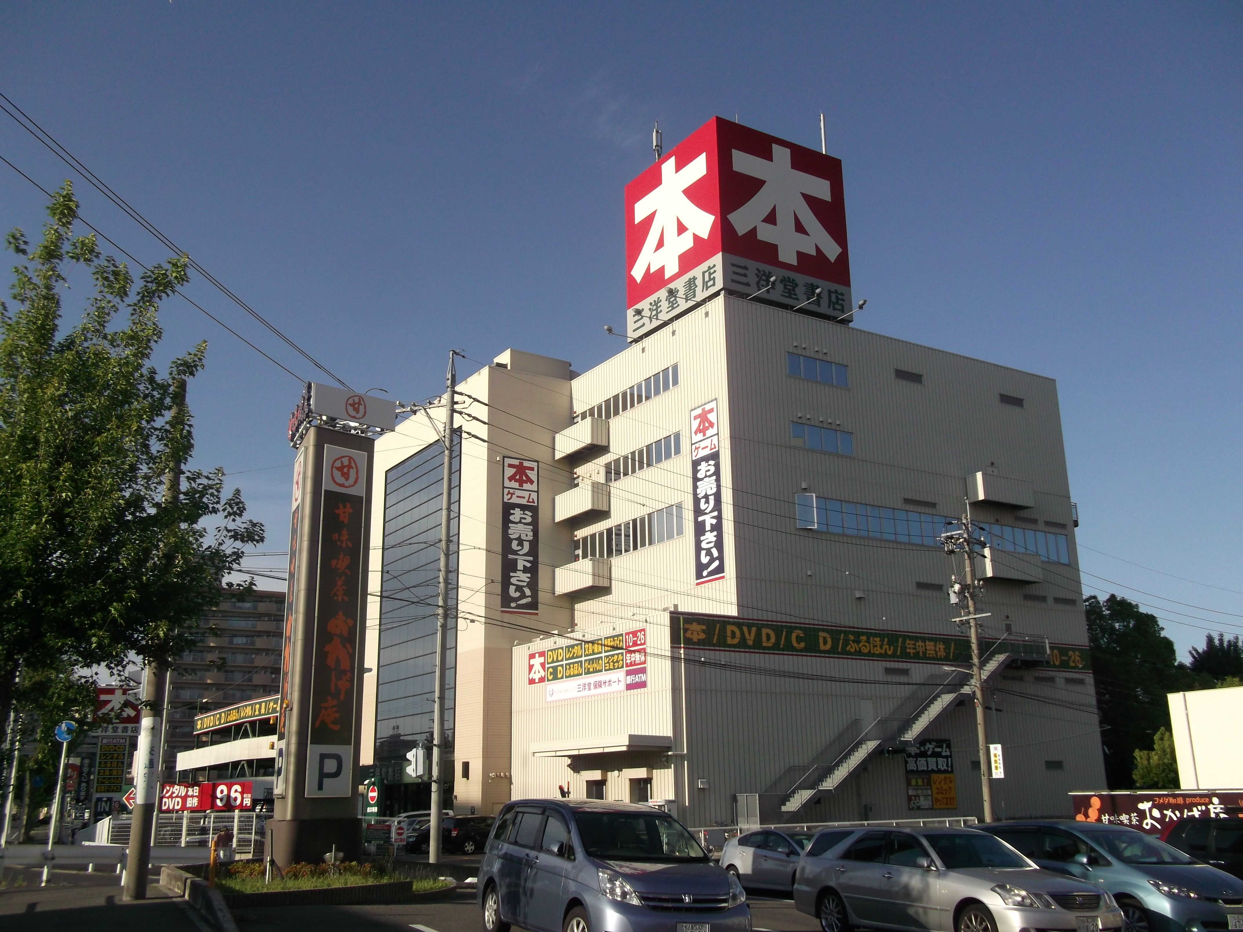 名古屋市瑞穂区新開町の三洋堂書店本社を西側公道南側から写す